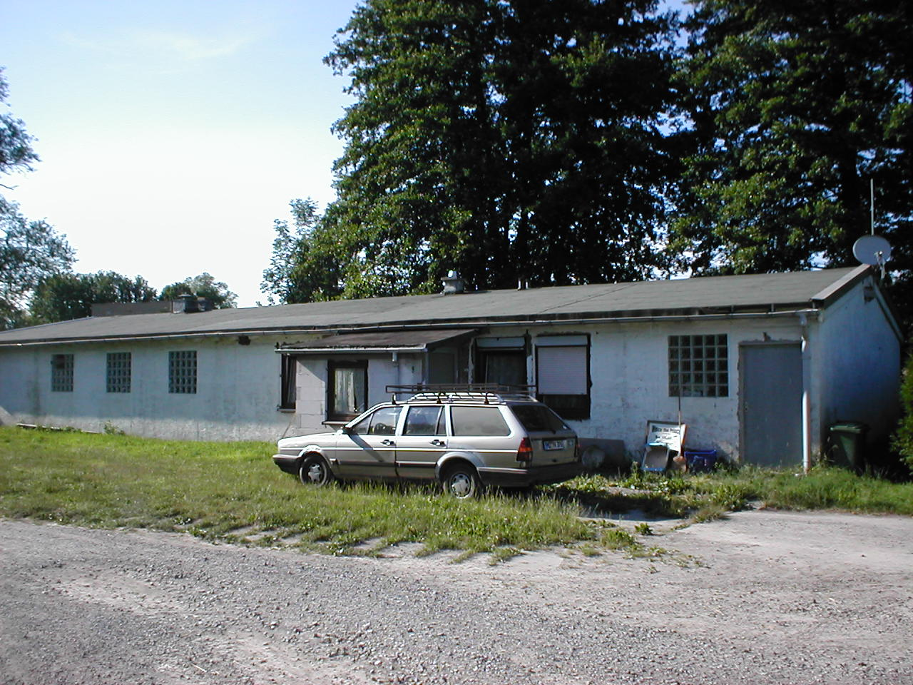 Baracke des Unterkommandos Neckarbischofsheim der Außenstelle Neckarelz des KZ Natzweiler im Wiesental bei Neckarbischofsheim. Die Baracken des Lagers wurden nach 1945 zu Wohnzwecken umgenutzt und begründeten die heutige Schwarzbachsiedlung.